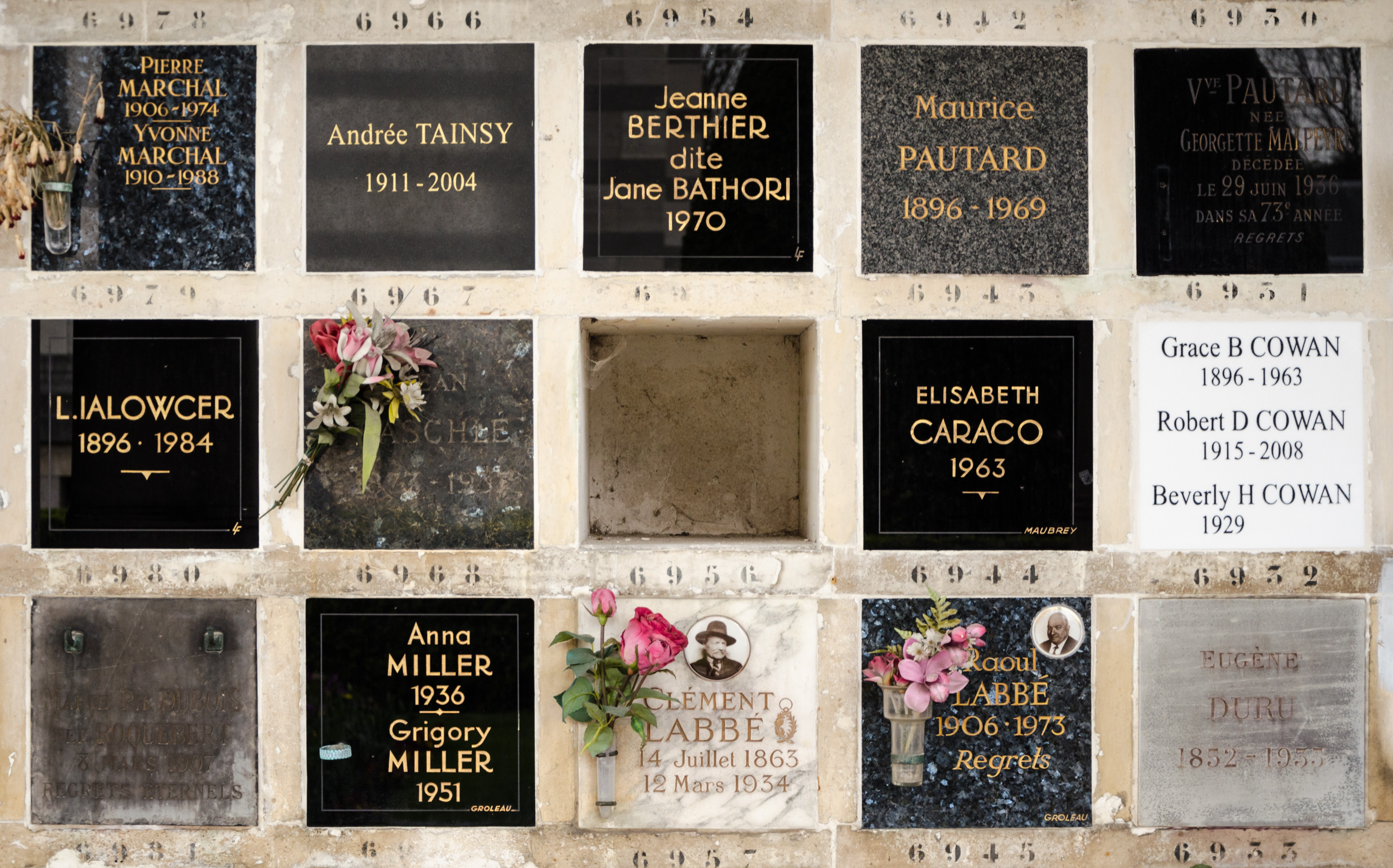 Cases du columbarium du cimetière du Père-Lachaise.